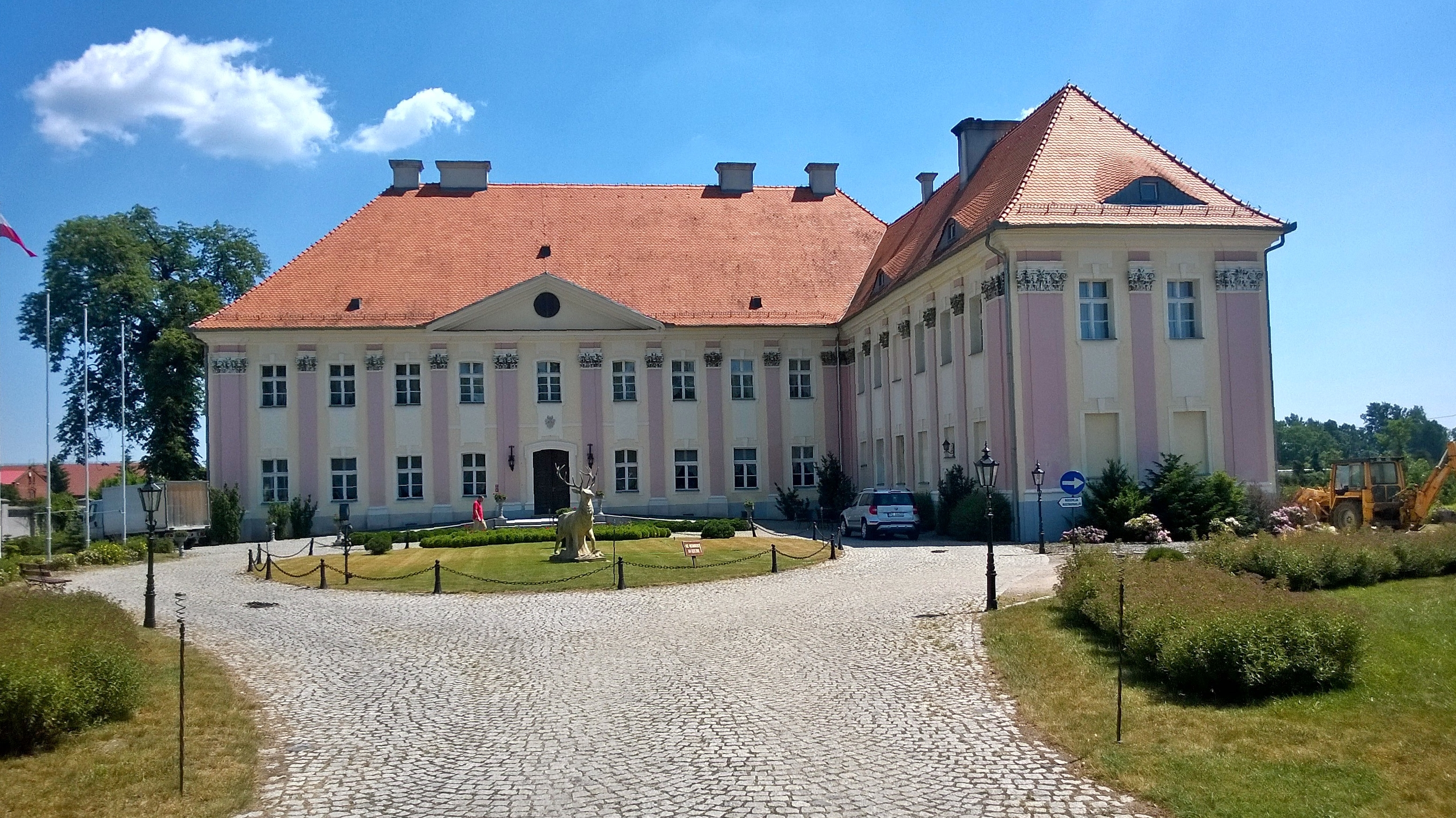 Trzebosz - pałac, XVIII